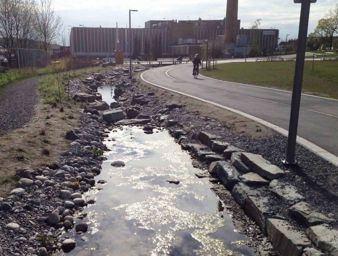 Rekonstruert stykke av Hovinbekken i Oslo, rett sør for Grenseveien.